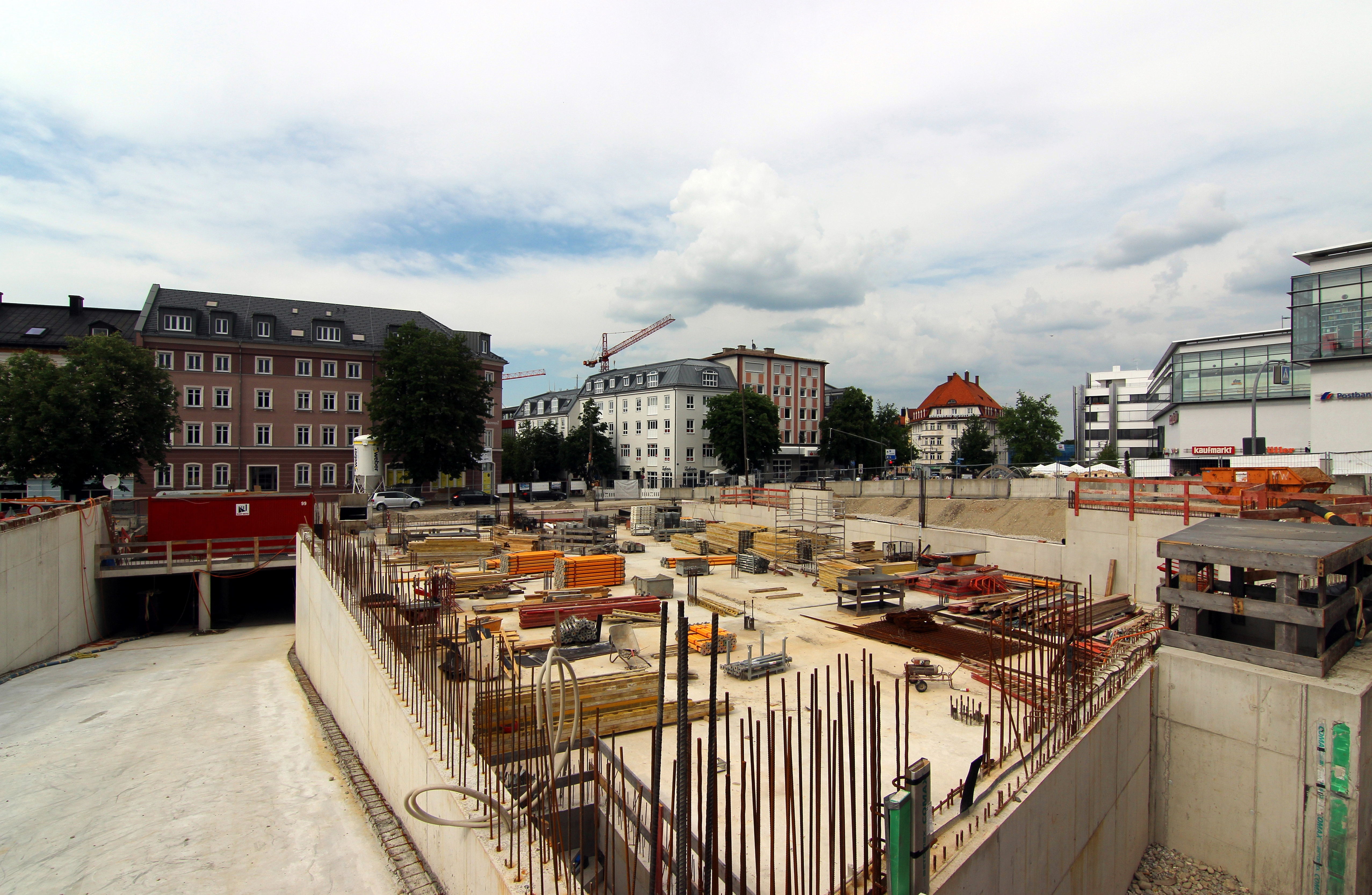 Dauerbaustelle Ecke Bahnhof-, Mozartstraße: "August-Fischer-Haus" Garage in Eigenregie der Stadt Kempten fertiggestellt